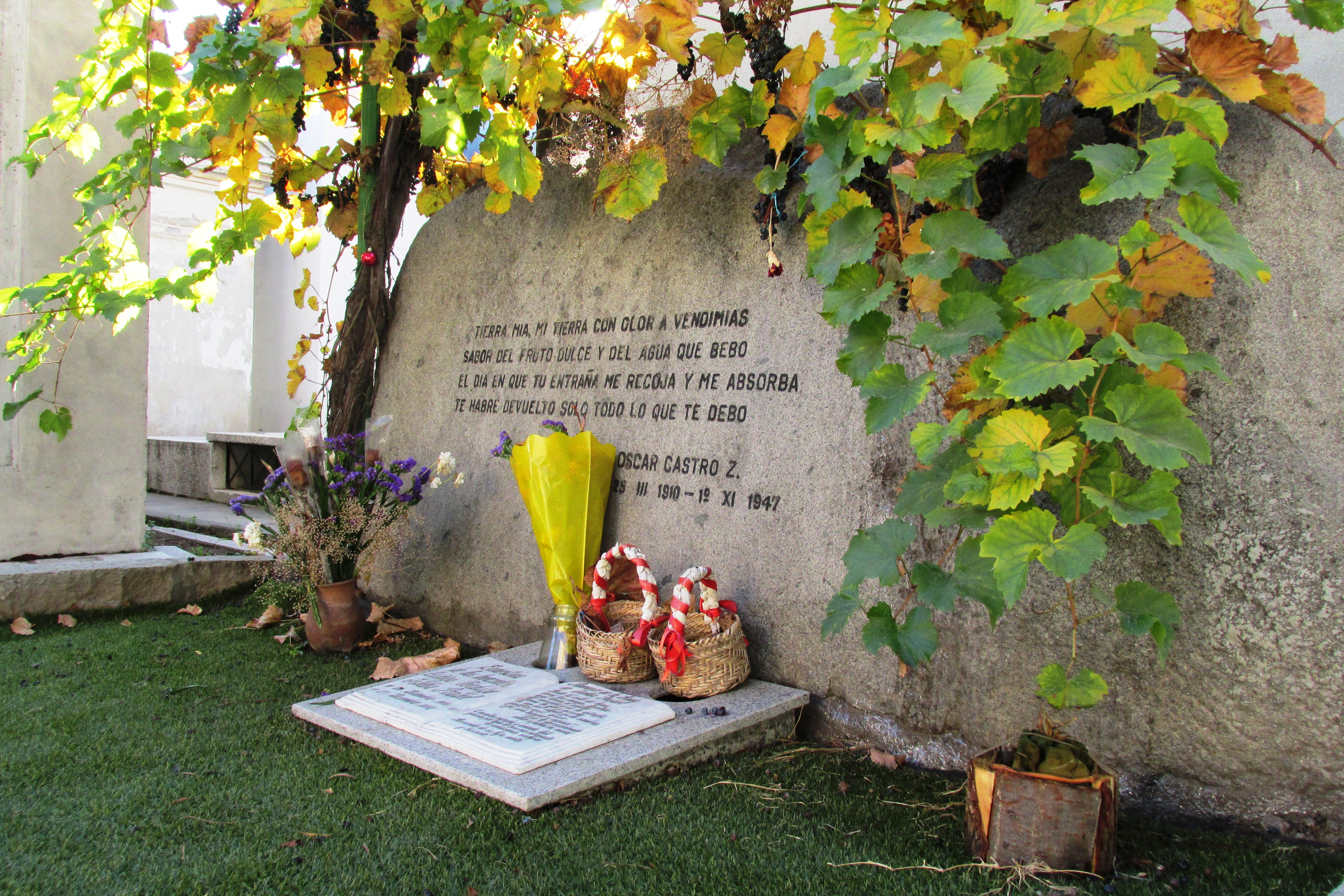 Tumba Óscar Castro Zúñiga en Cementerio N°1 Rancagua